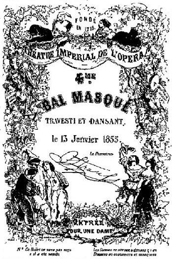 Entrée au bal masqué de l'Opéra, carnaval 1854-1855.